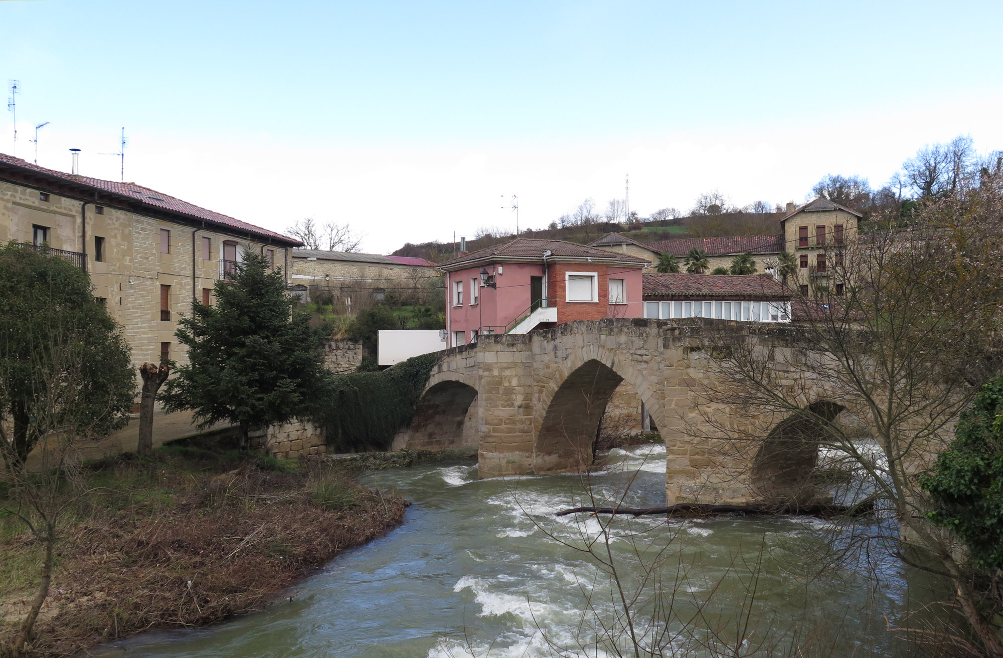 Río Omecillo a su paso por Bergüenda (Álava, España)